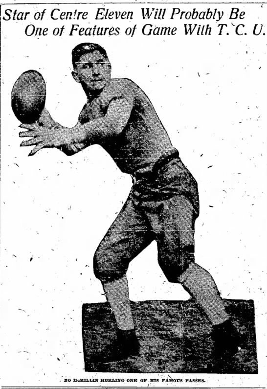 Bo McMillin, Centre quarterback